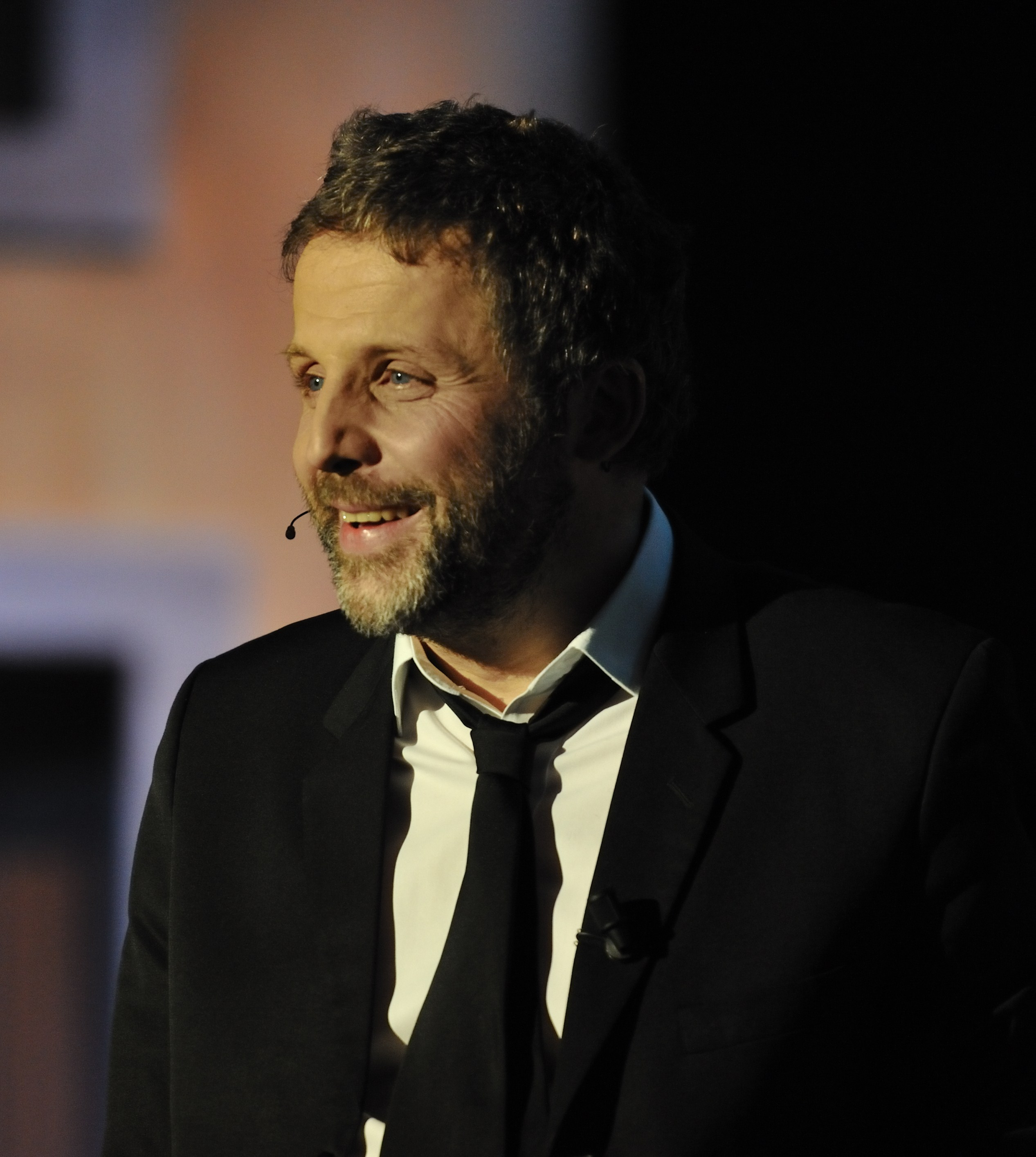 Stéphane Guillon